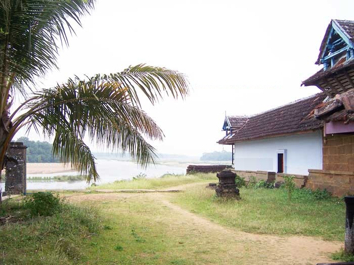 അഞ്ചുമൂർത്തിക്ഷേത്രം ശിവനട